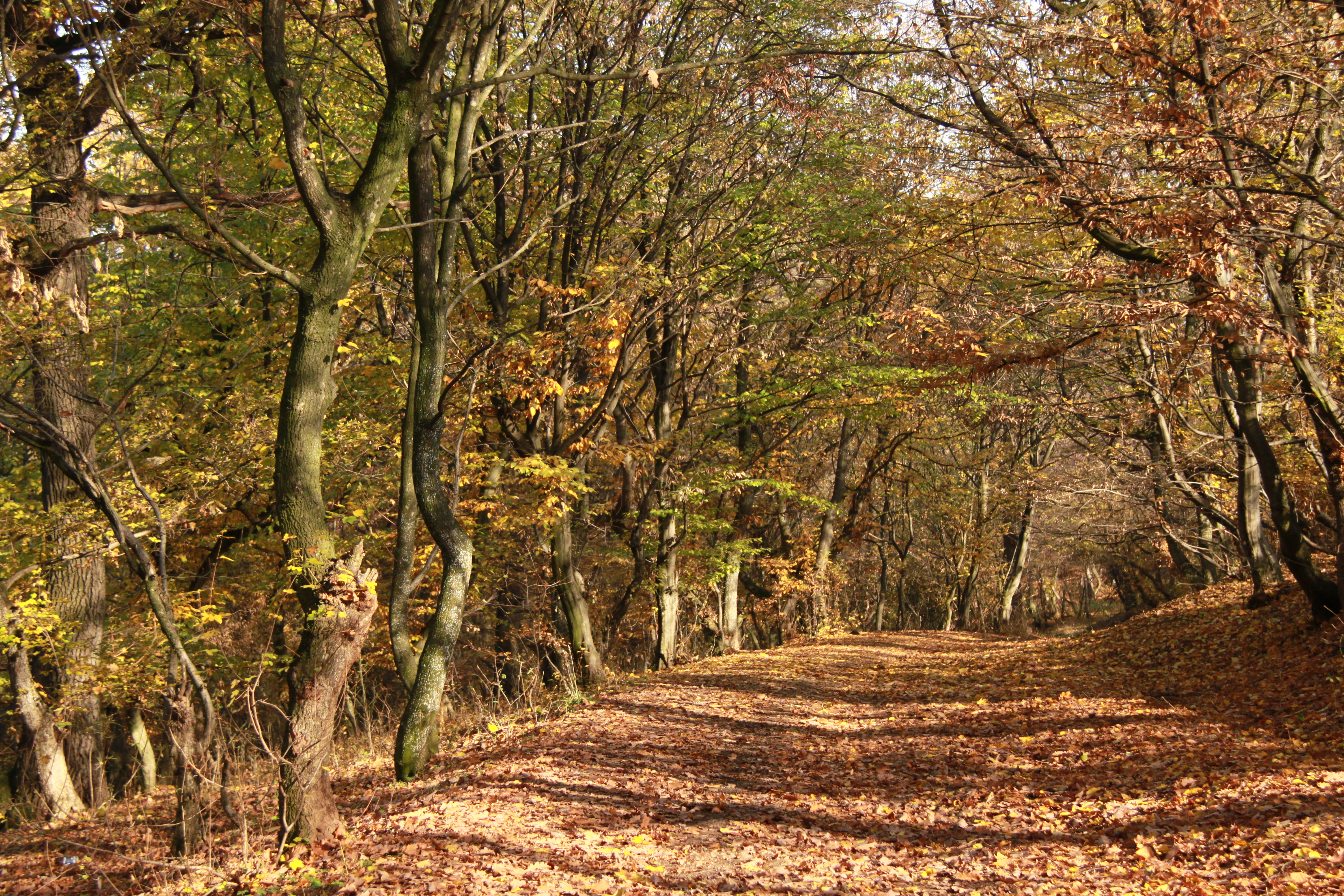 Cluj-Napoca, Noiembrie 2012